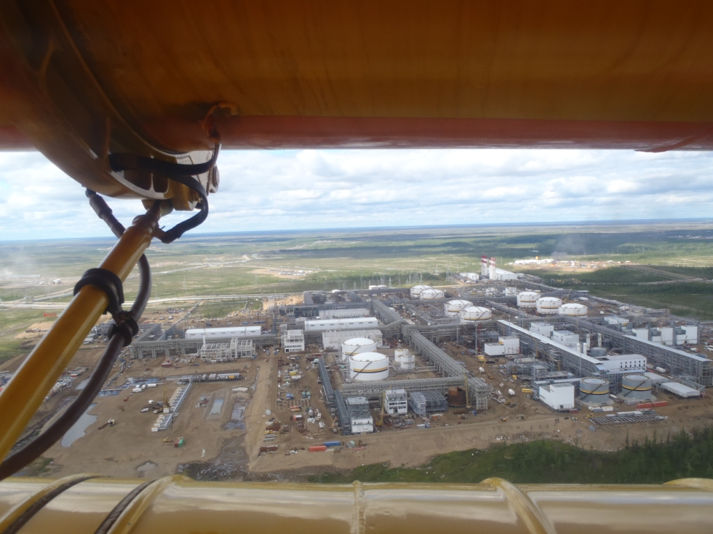 центральный пункт сбора нефти (ванкор-роснефть)